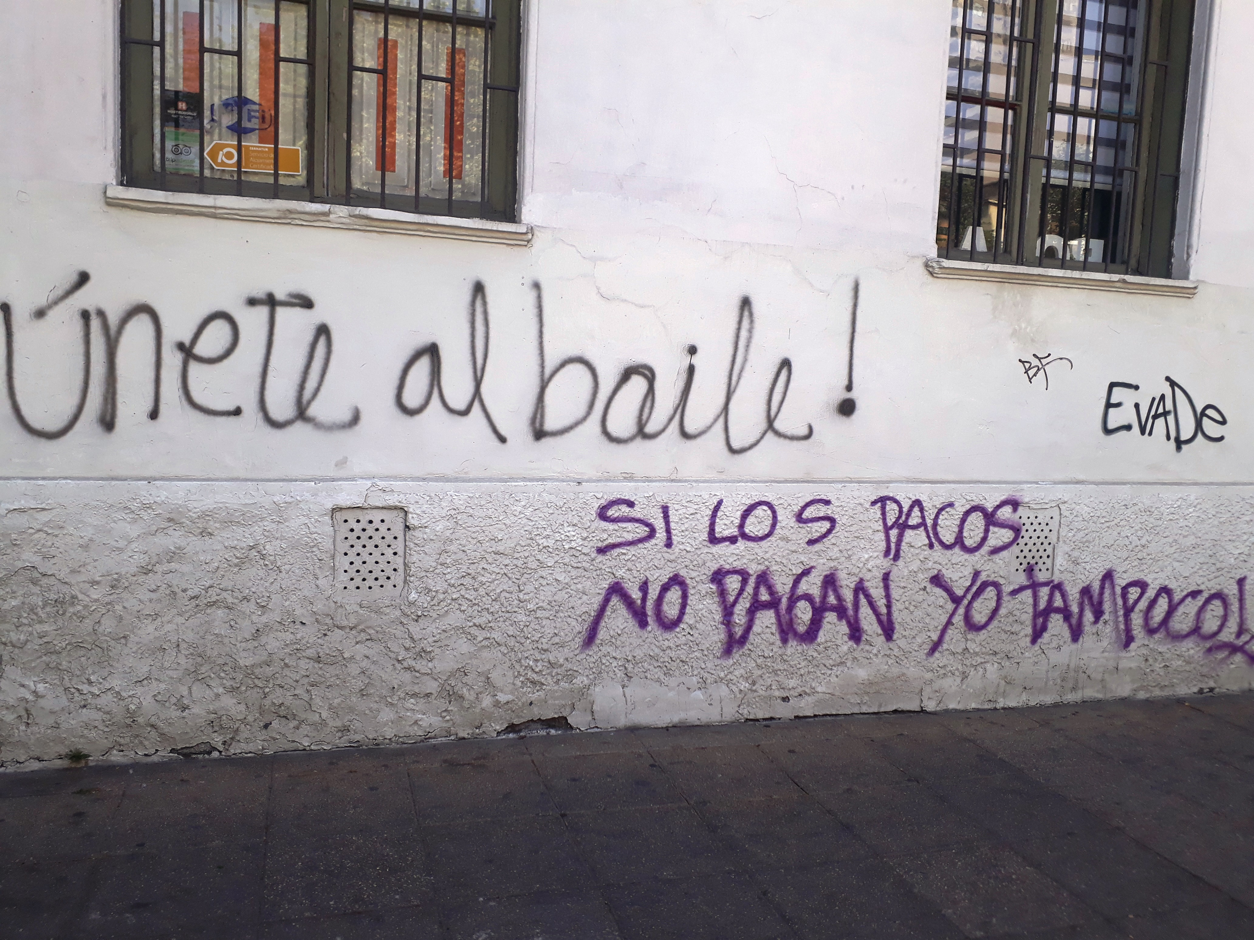 Escritos en favor de las manifestaciones de octubre en Santiago de Chile 2019